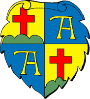 Schild des Wappens des Klosters Alpirsbach, gemäß Blasonierung koloriert